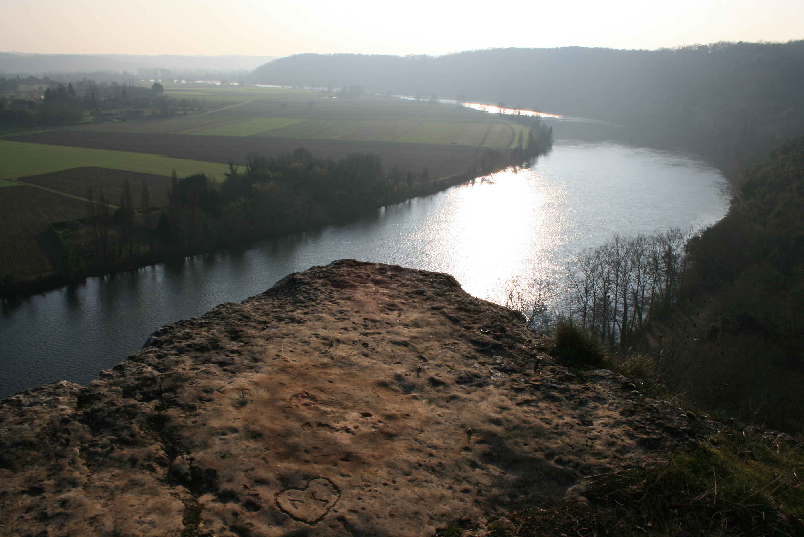 La Dordogne en janvier, Trémolat